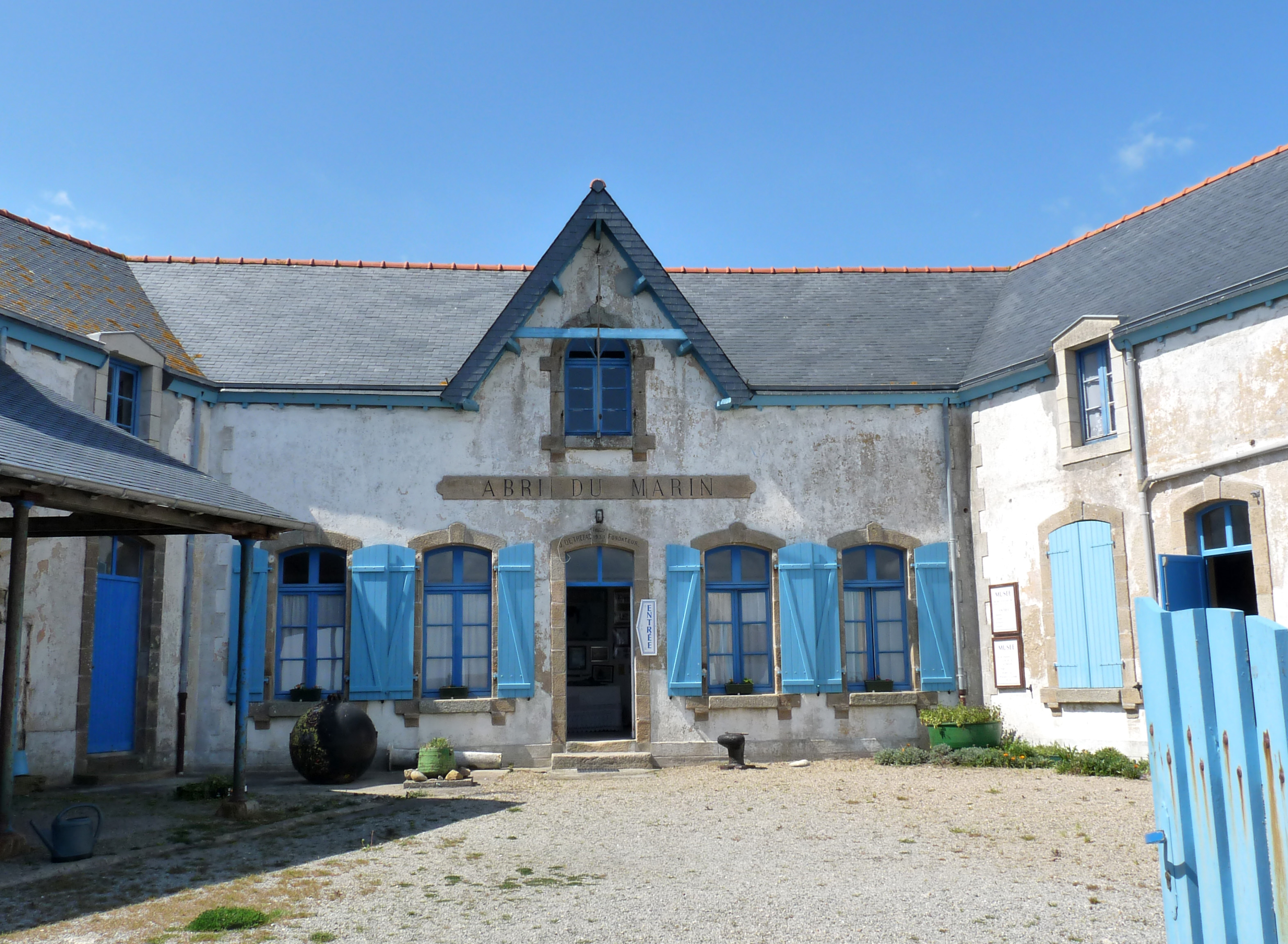 "L'Abri du marin", petit musée à l'île de Sein (Finistère, Bretagne)